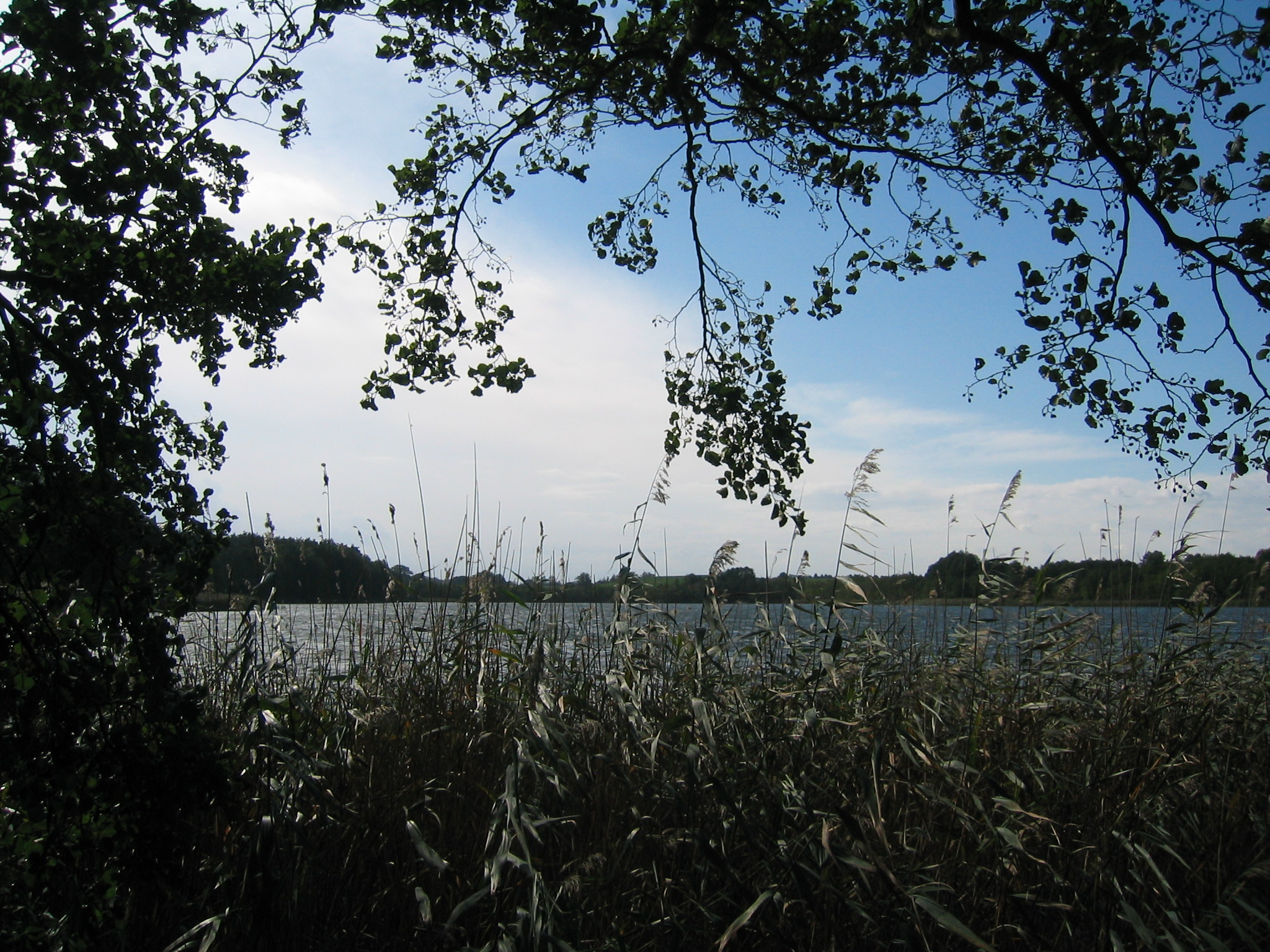 Mühlensee bei Willmine in der Uckermark.